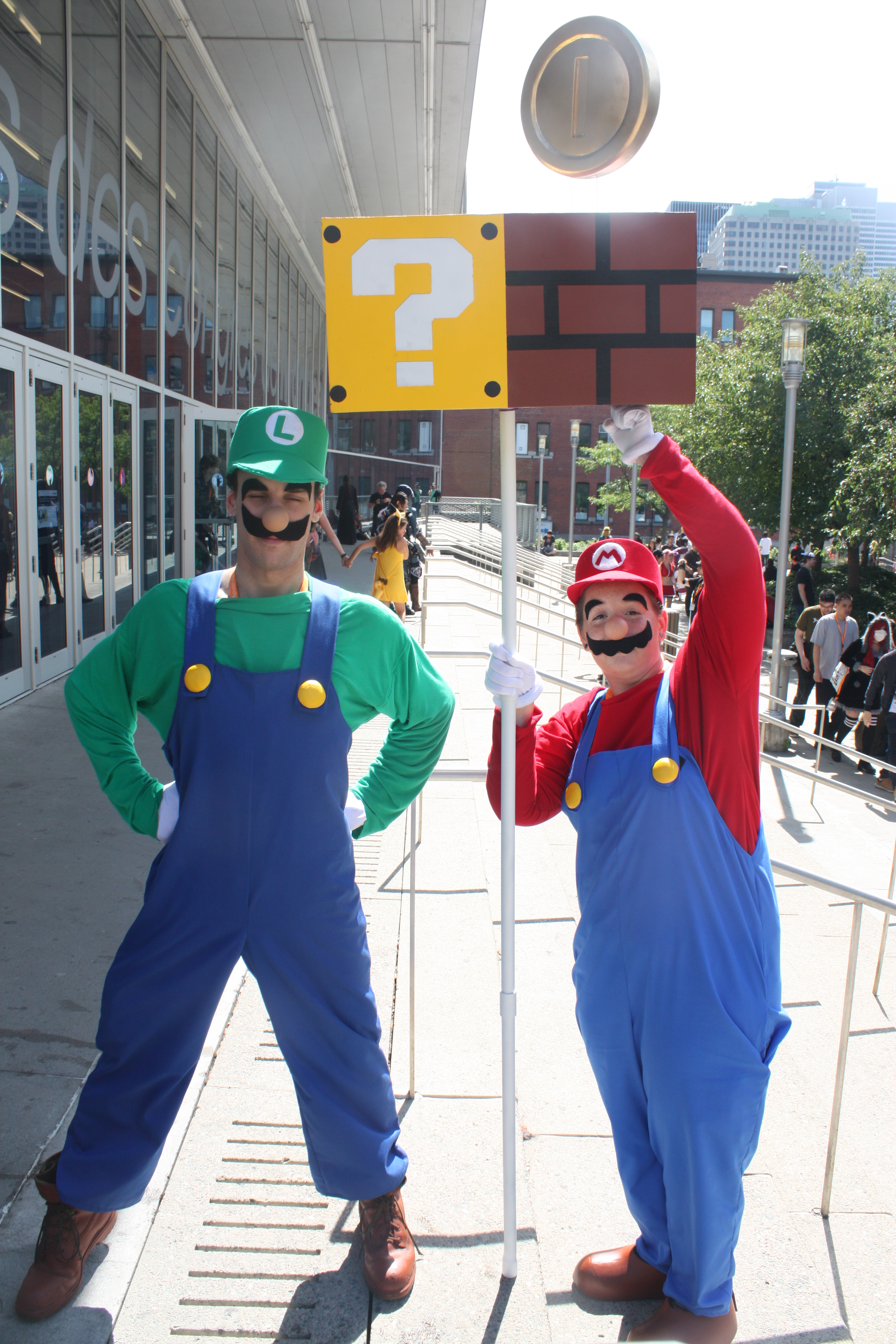 Otakuthon 2015，超級瑪利歐兄弟的cosplayer群。